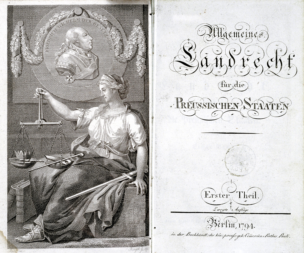 Erstausgabe des Allgemeinen Landrechts für die Preußischen Staaten von 1794